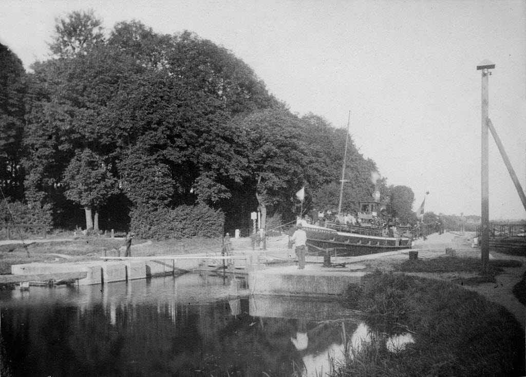 in der Friedrichschleuse des Eiderkanals bei Holtenau.